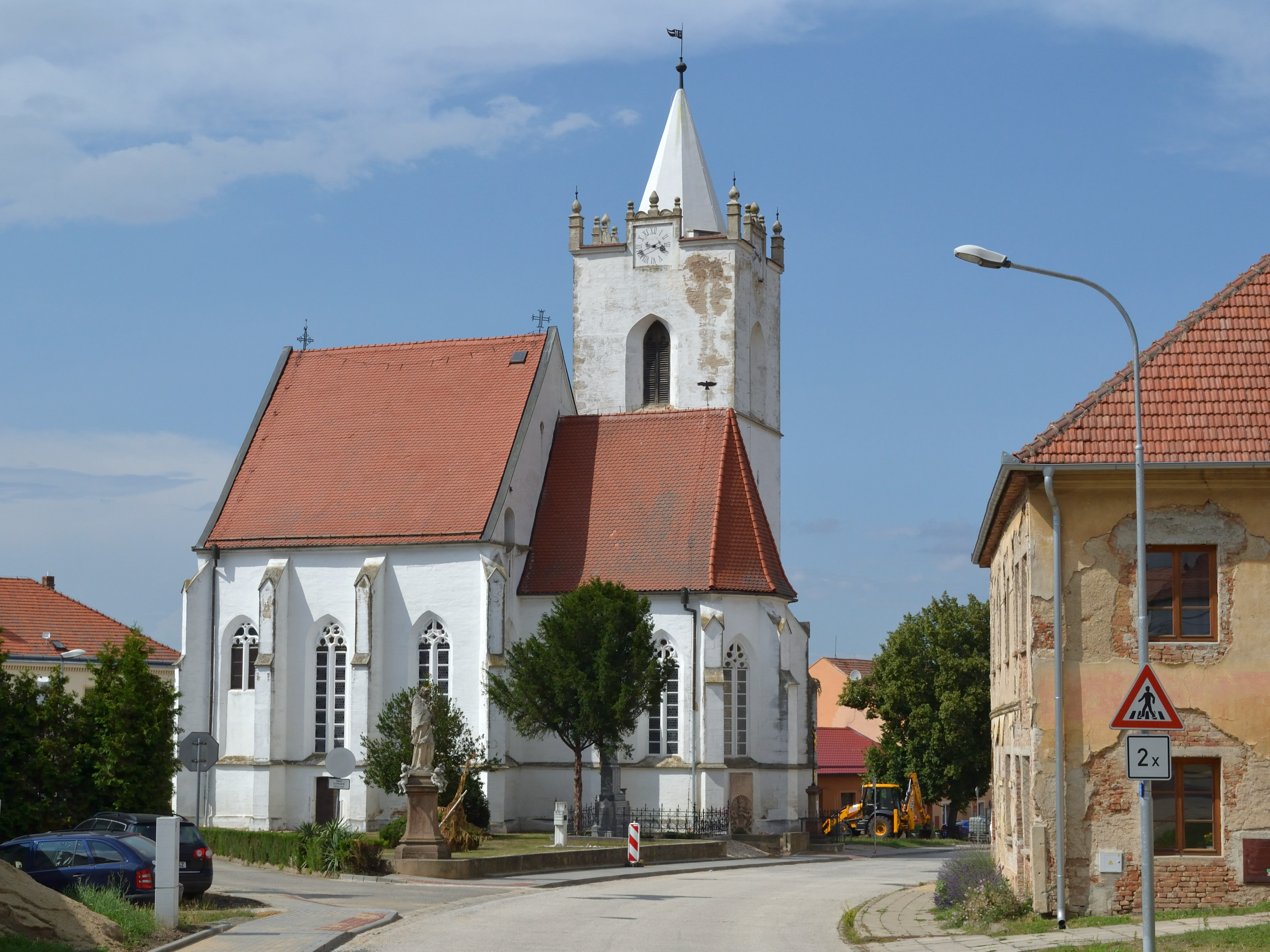 Pouzdřany - kostel svatého Mikuláše a Václava